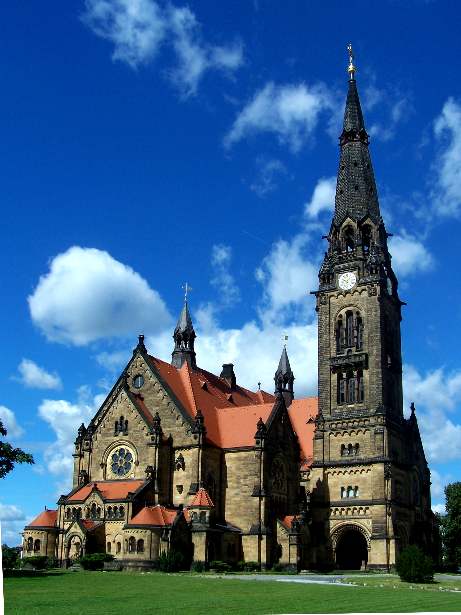 Die Garnisonkirche in Dresden, Ostseite